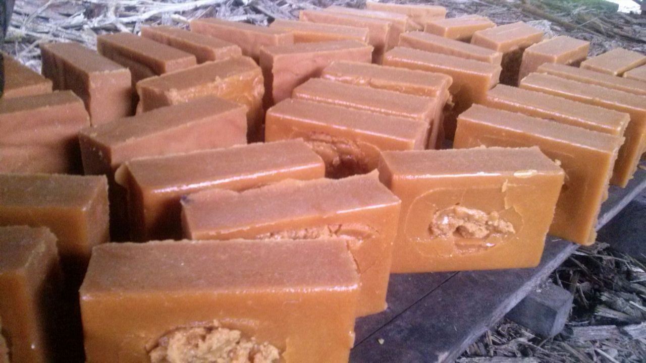 Panela en cuadros, producto de Monopamba, Nariño, Colombia.